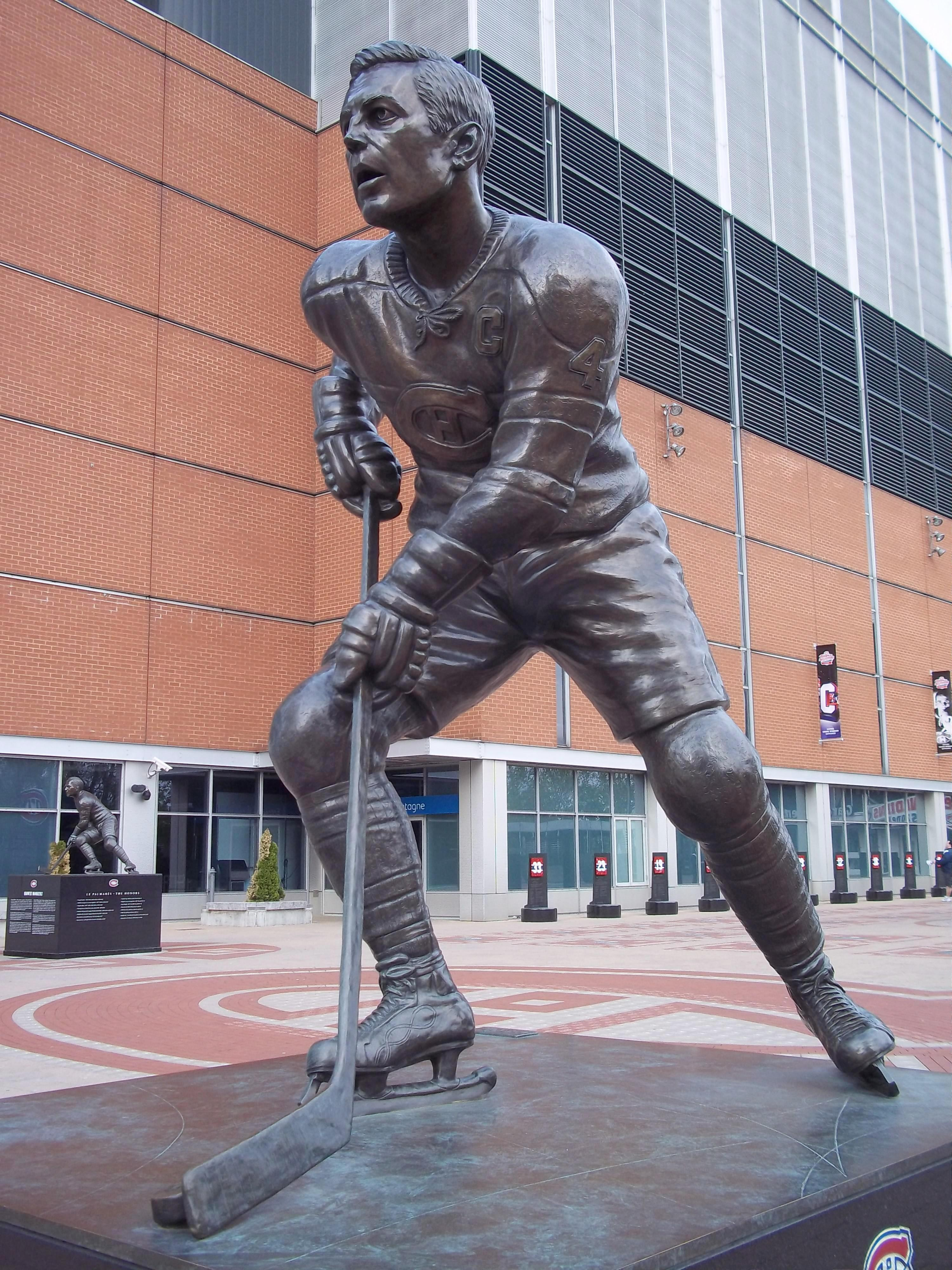 Statue de Jean Béliveau, Centre Bell, Montréal